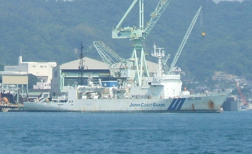 海上保安庁 大型測量船 HL02 "拓洋" 投稿者が広島県尾道市因島で撮影